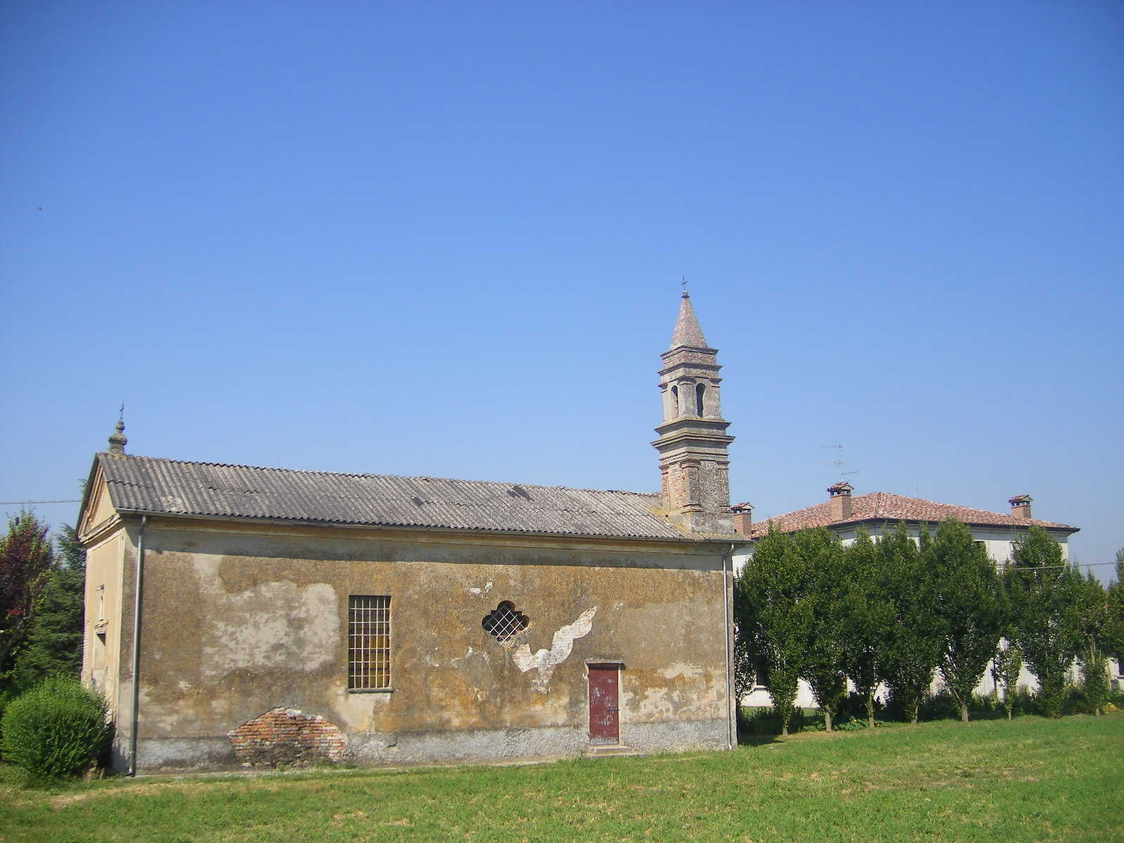 Riva (comune Suzzara)